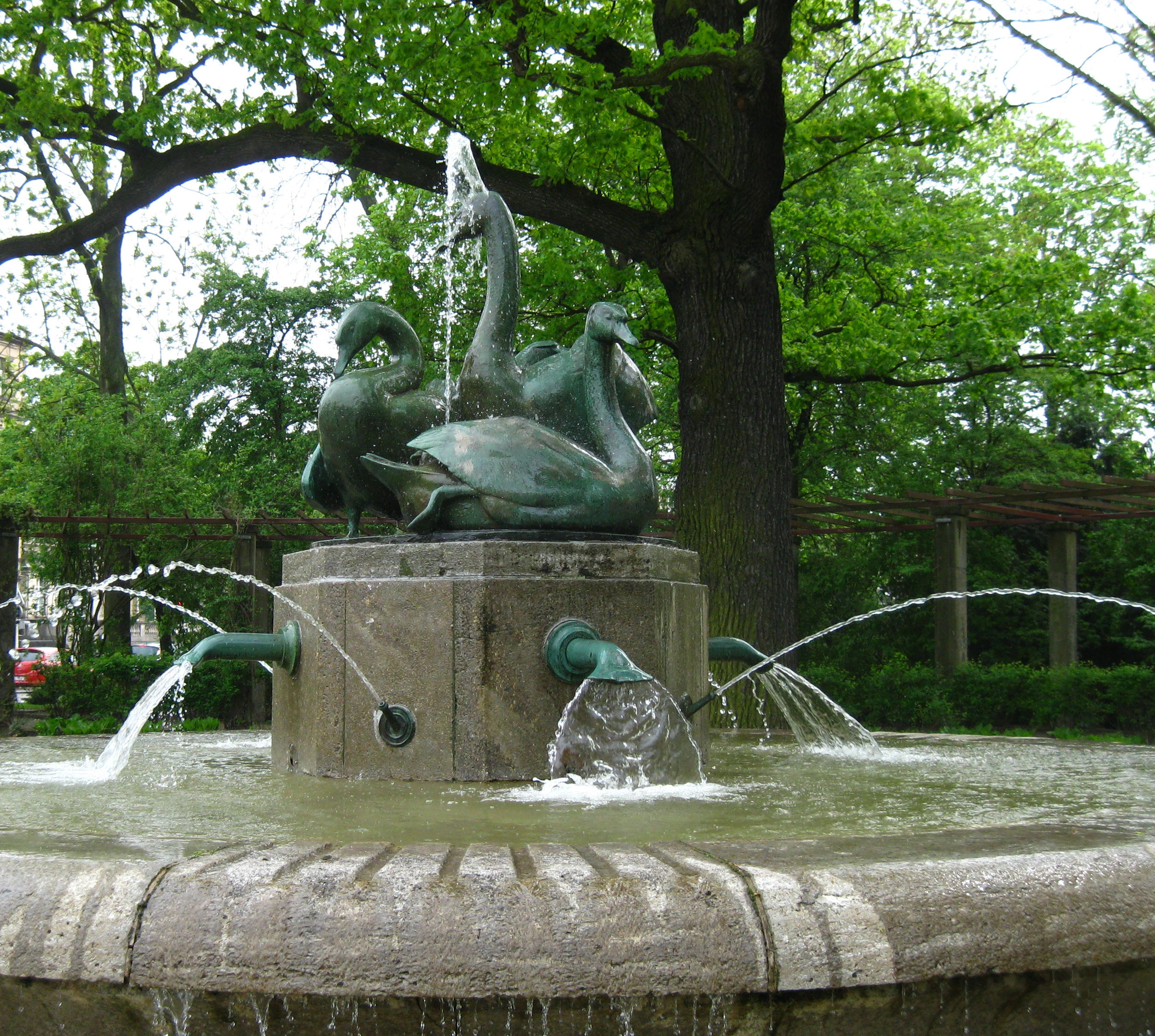 1935 von Bildhauer Paul Berger aus Bronze geschaffen, steht am Schwanenteichpark, Alte Reichenbacher Straße / Humboldtstraße